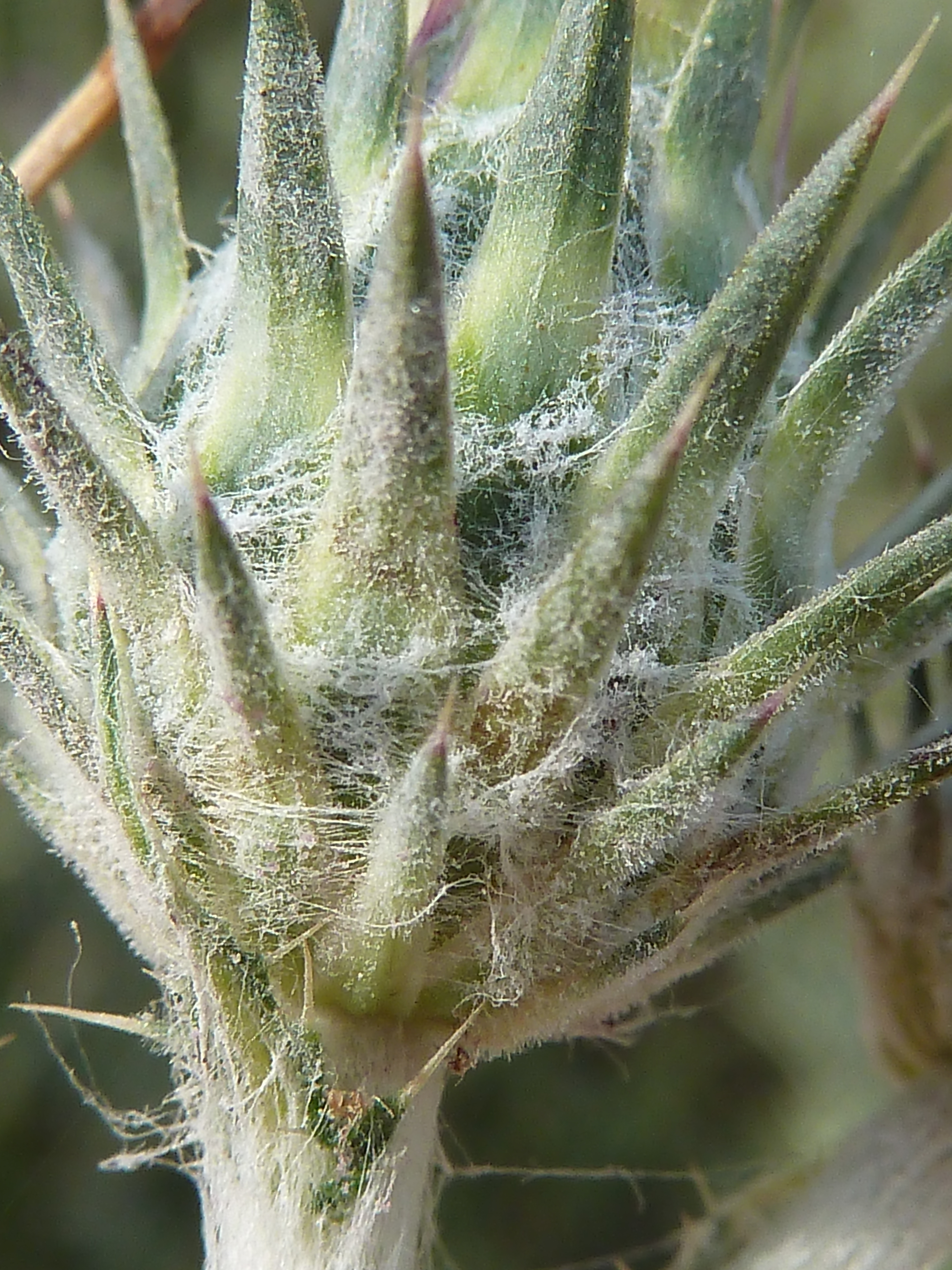 Carduus pycnocephalus (Cardo, cardo borriquero, cardo negro) - Capítulo: detalle del indumento involucral. - Descampado circa Biblioteca, Albatera (Provincia de Alicante, España).